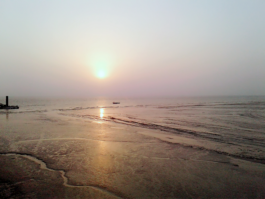 বঙ্গোপসাগর